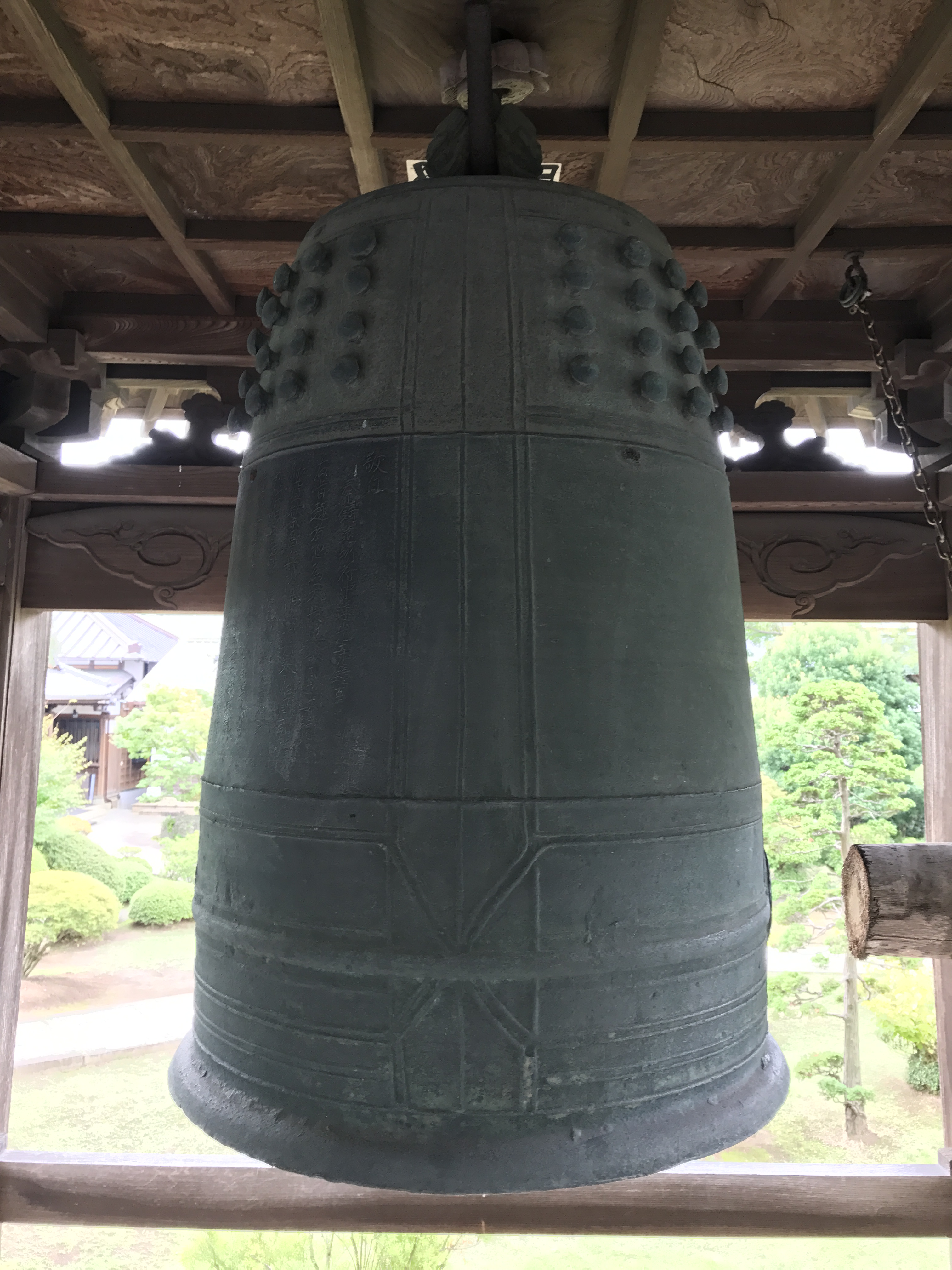 霊山寺梵鐘（静岡県沼津市）